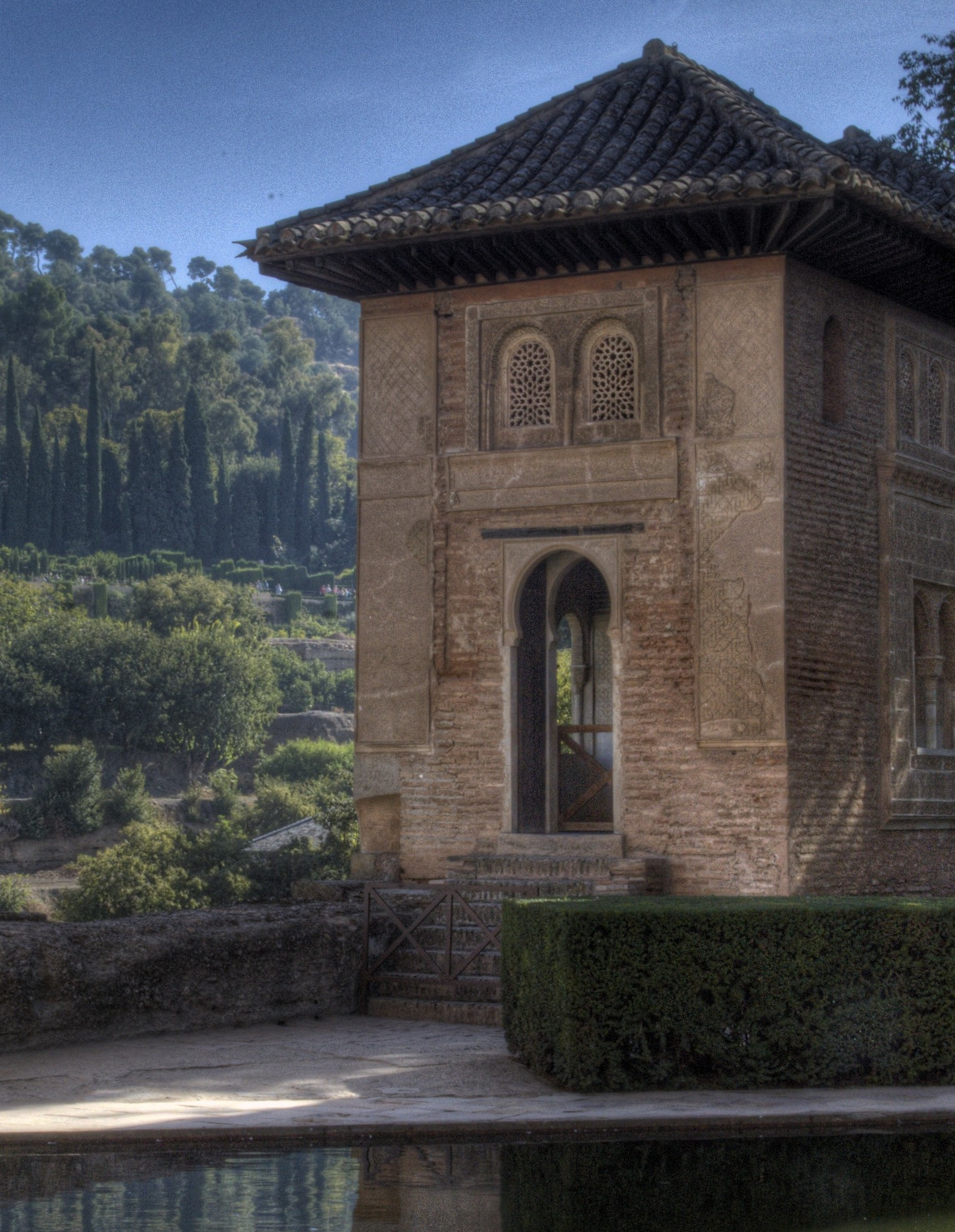 Sendas del Generalife